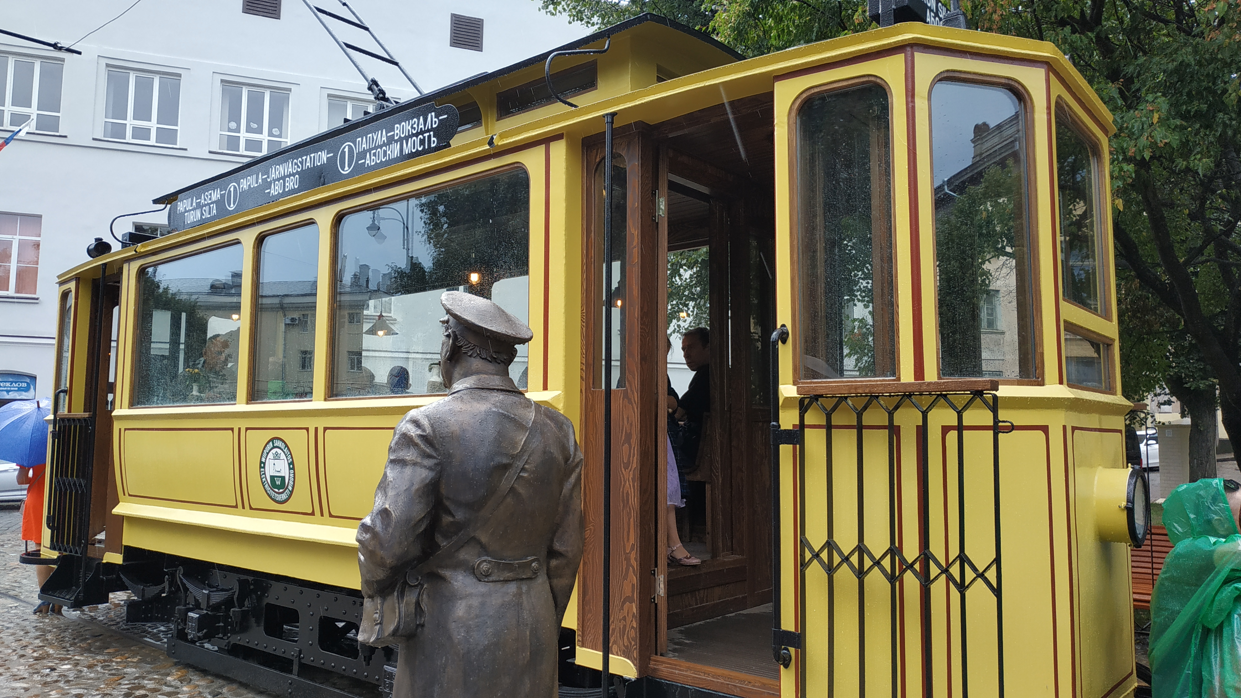 Рядом со входом в трамвай разместилась статуя усатого вагоновожатого, приветствующего пассажиров, а позади экспозиции прячется «мальчишка на колбасе» — так называли детей, которые бесплатно катались на трамвае.